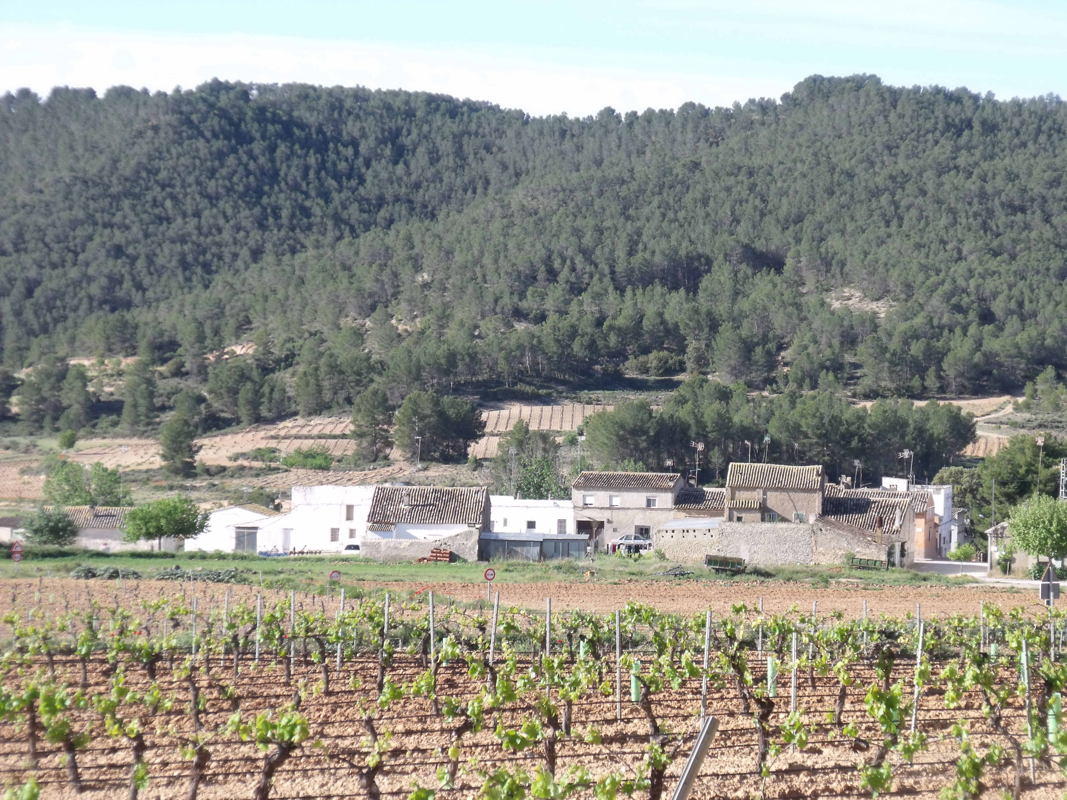 Vista general de la pedanía de Requena